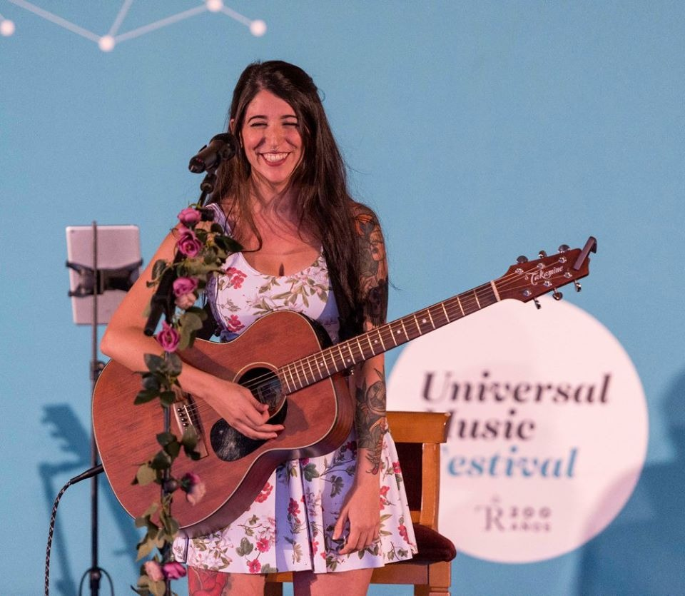 Bely Basarte, al finalizar su concierto en el Universal Music Festival